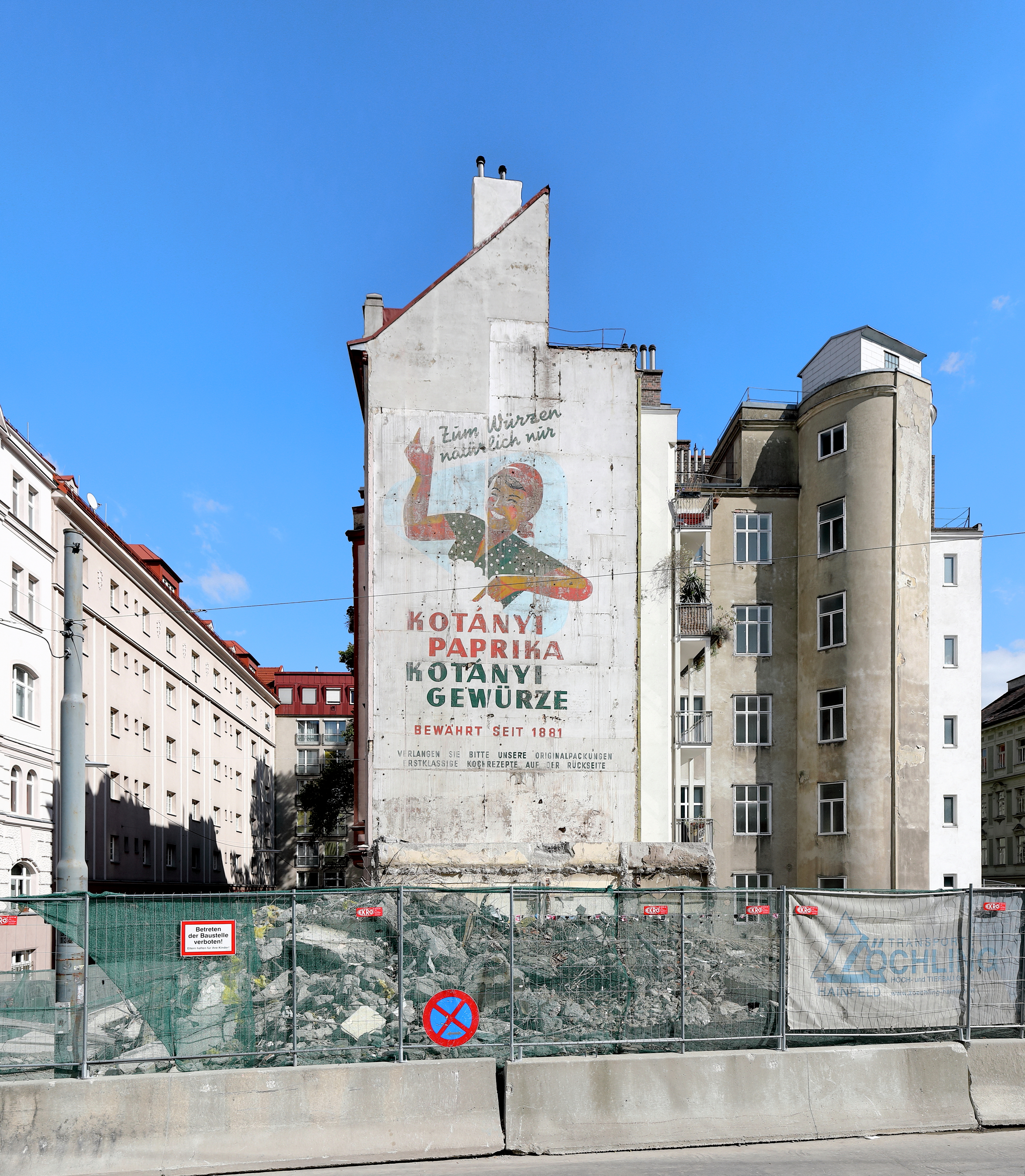 Sujet der Gewürzhandeslfirma Kotányi in der Nussdorfer Strasse im 9. Wiener Gemeindebezirk Alsergrund. Das Sujet wurde um 1963 von der Firma Stern Schilder & Siebdruck an der Westwand des Hauses Latschkagasse 4 angebracht. Anfang der 1970er Jahre wurde direkt an die Wand das Finanzamt für den 9., 18., 19. Bezirk und Klosterneuburg angebaut. Nachdem dieses im Jahr 2012 in die Marxergasse 4, 1030 Wien umzog, wurde das ehemalige Finanzamt im Jahr 2016 abgetragen, dabei kam das Sujet wieder zu Tage.